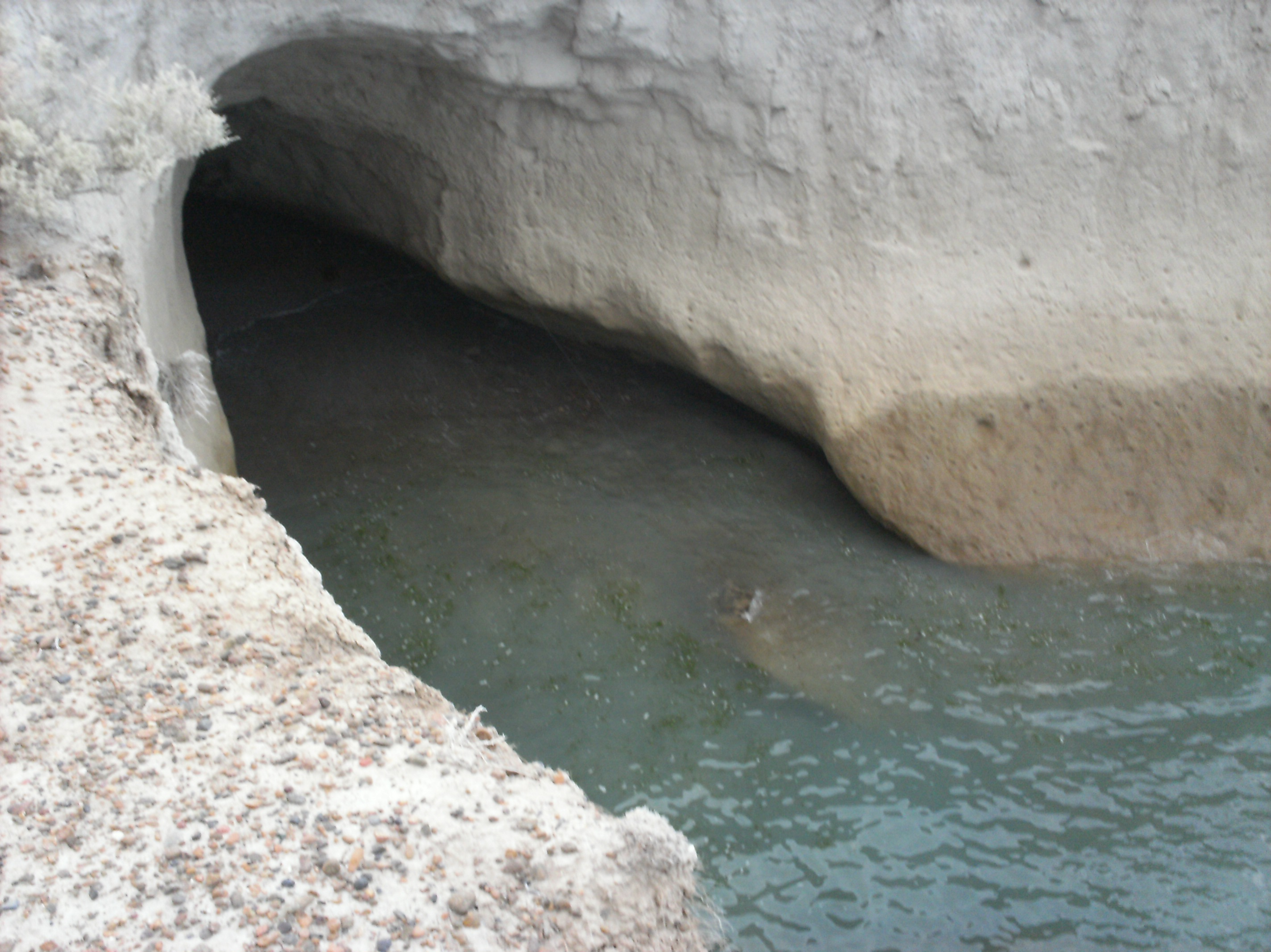 cueva en el Cabo San Jorge, en inmediaciones a comodoro, Argentina